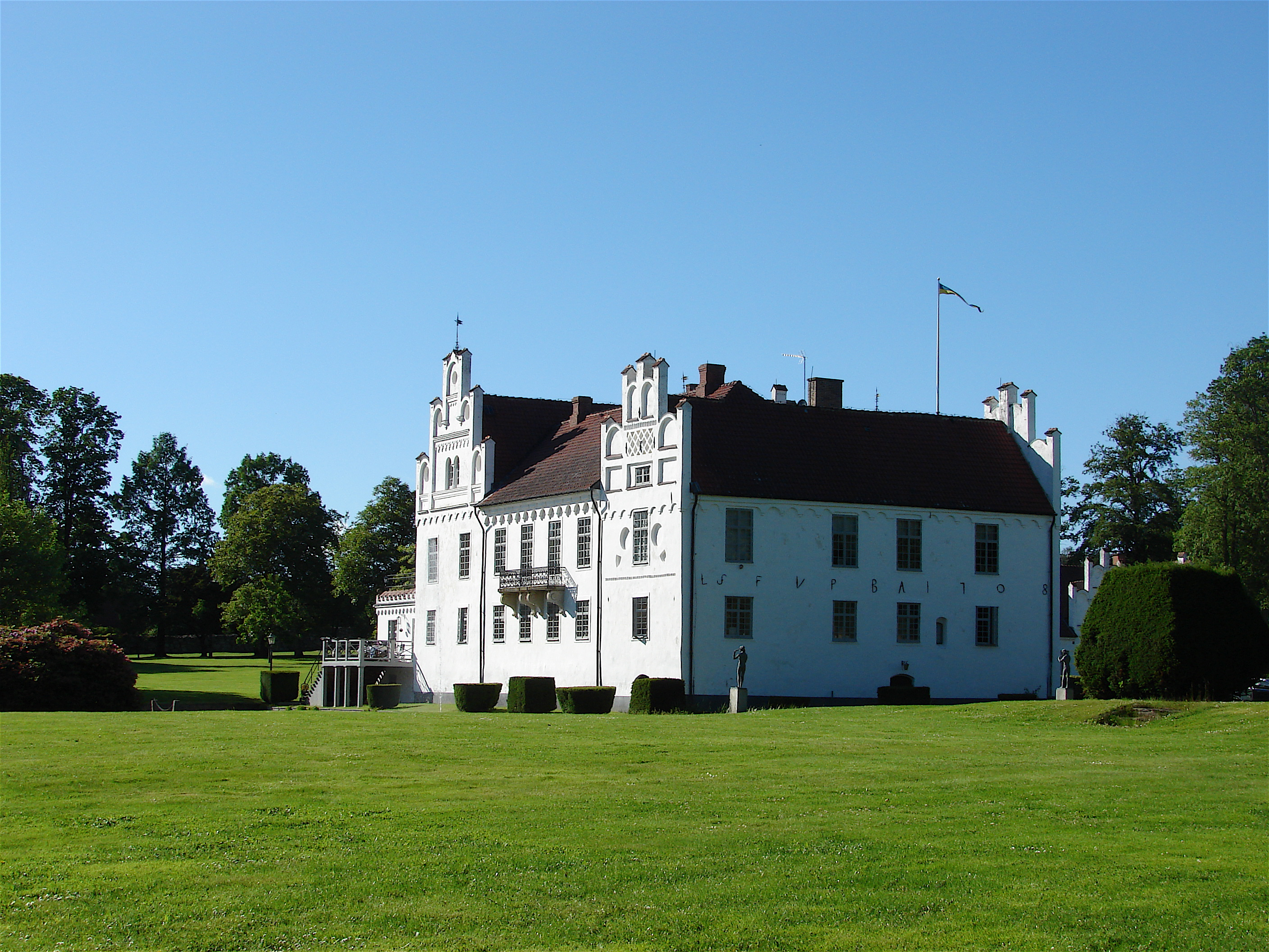 Wanås Slot, Vanås Slott, Vanås castle, Scania, Skåne